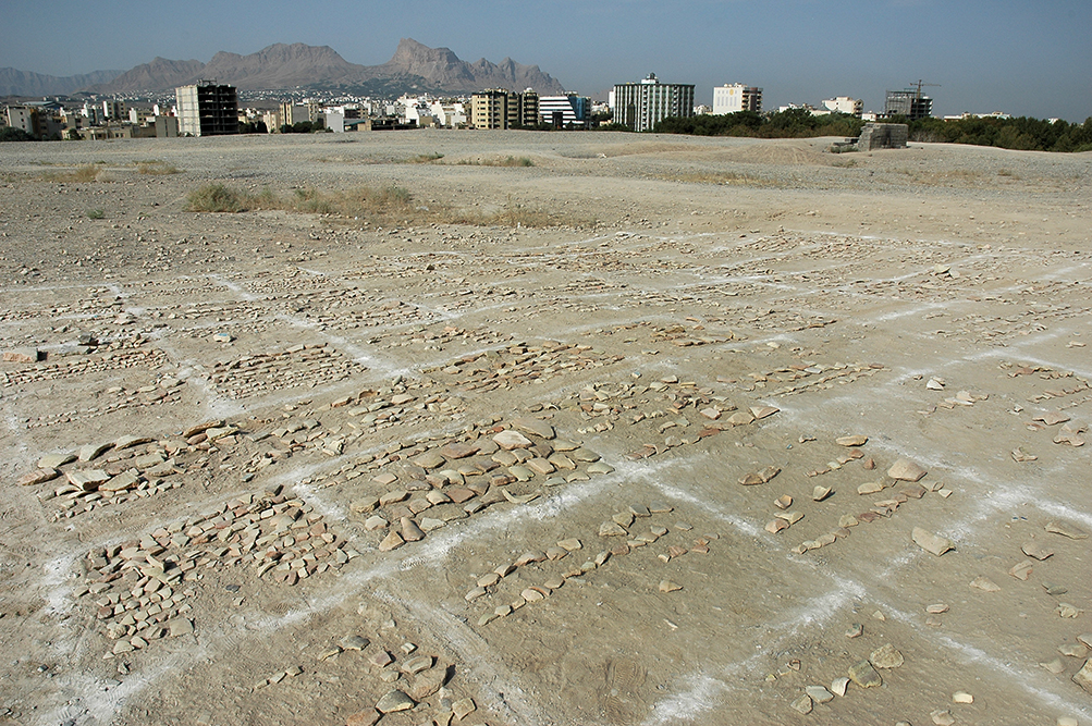 تپه اشرف